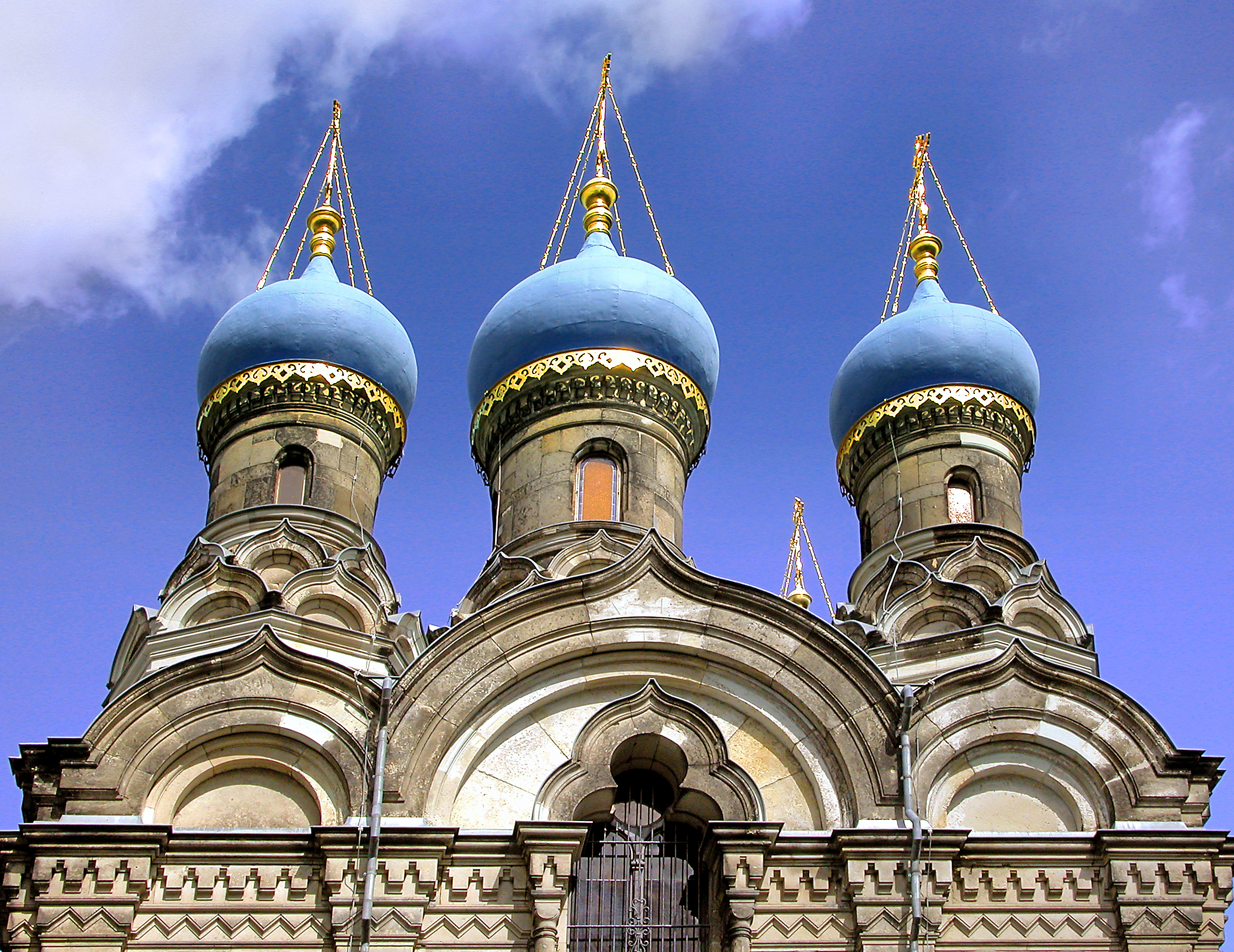 30.08.2007 01069 Dresden-Südvorstadt, Fritz-Löffler-Straße (GMP: 51.033501,13.731251): Russisch-Orthodoxe Kirche des heiligen Simeon vom wunderbaren Berge. Erbaut wurde sie 1872-1874 nach Entwürfen des kaiserlich-russischen Hofarchitekten Harald Julius von Bosse und dem Dresdner Architekten u. Hochschullehrer Prof. Karl Robert Weißbach. Im Juni 1875 nahm Zar Alexander II. an einem Gottesdienst teil. Zwischen 1985 und 2007 wurde die Kirche saniert. 2010 erhält sie ein neues Leutwerk aus 8 im ukrainischen Donezk gegossenen Bronzeglocken Sicht von Süden. DSCN29201.TIF]20070830015DR.JPG(c)Blobelt